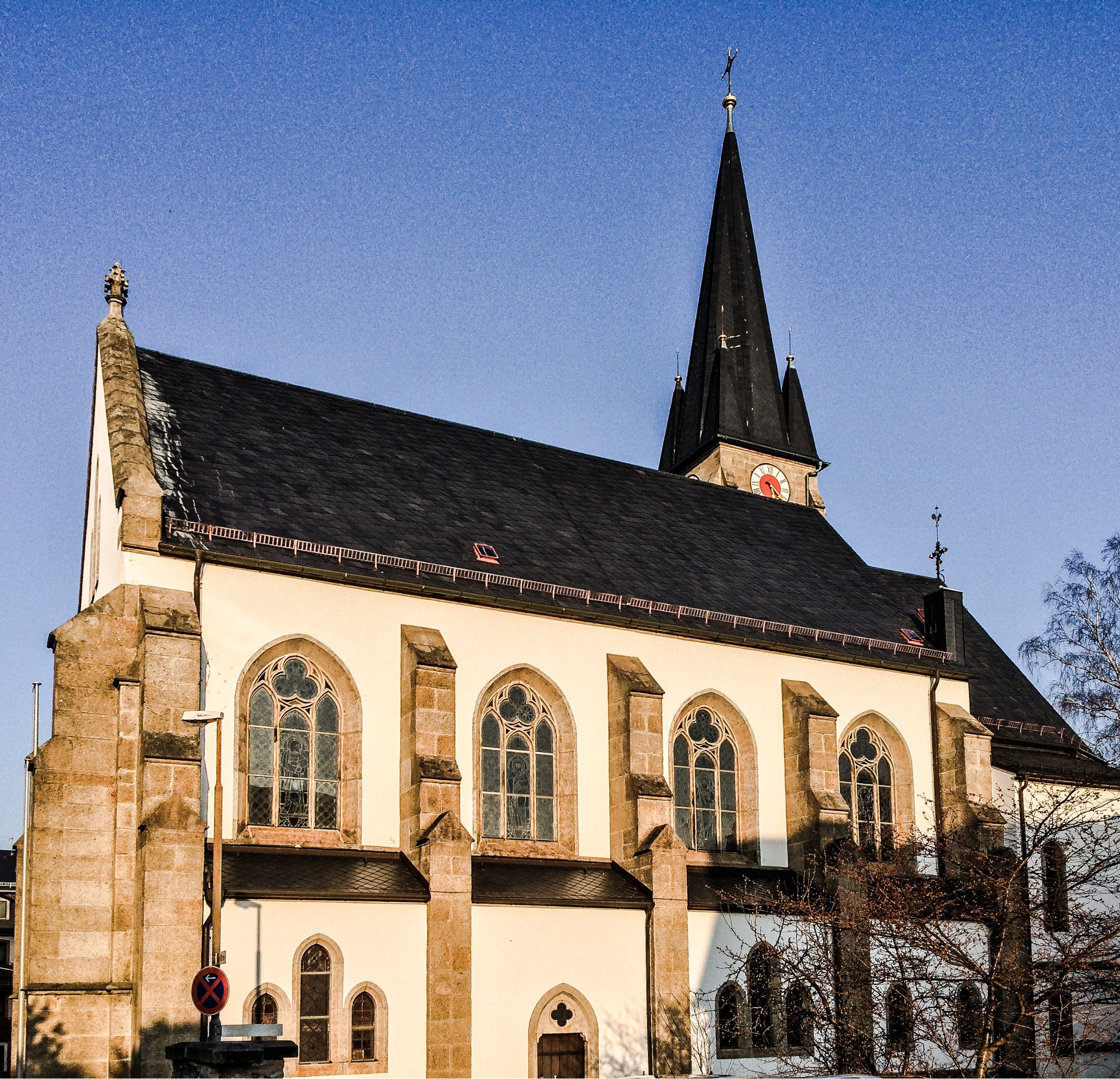 Seitenansicht der Kirche zu den zwölf Aposteln in Wunsiedel.